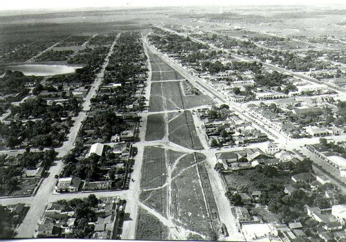 Linha Internacional da década de 1968